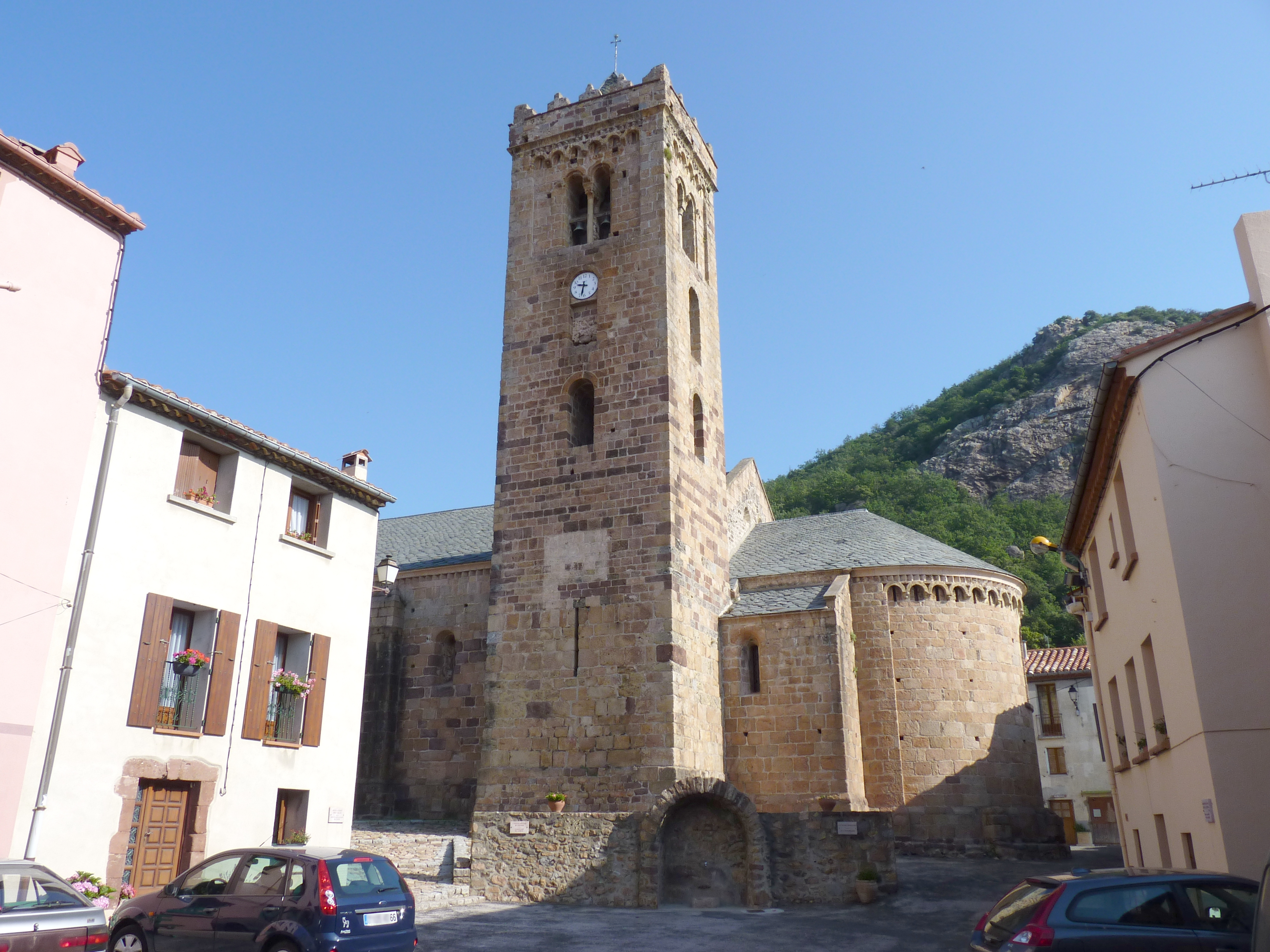 Église Notre-Dame, Coustouges (Pyrénées-Orientales, Languedoc-Roussillon, France)